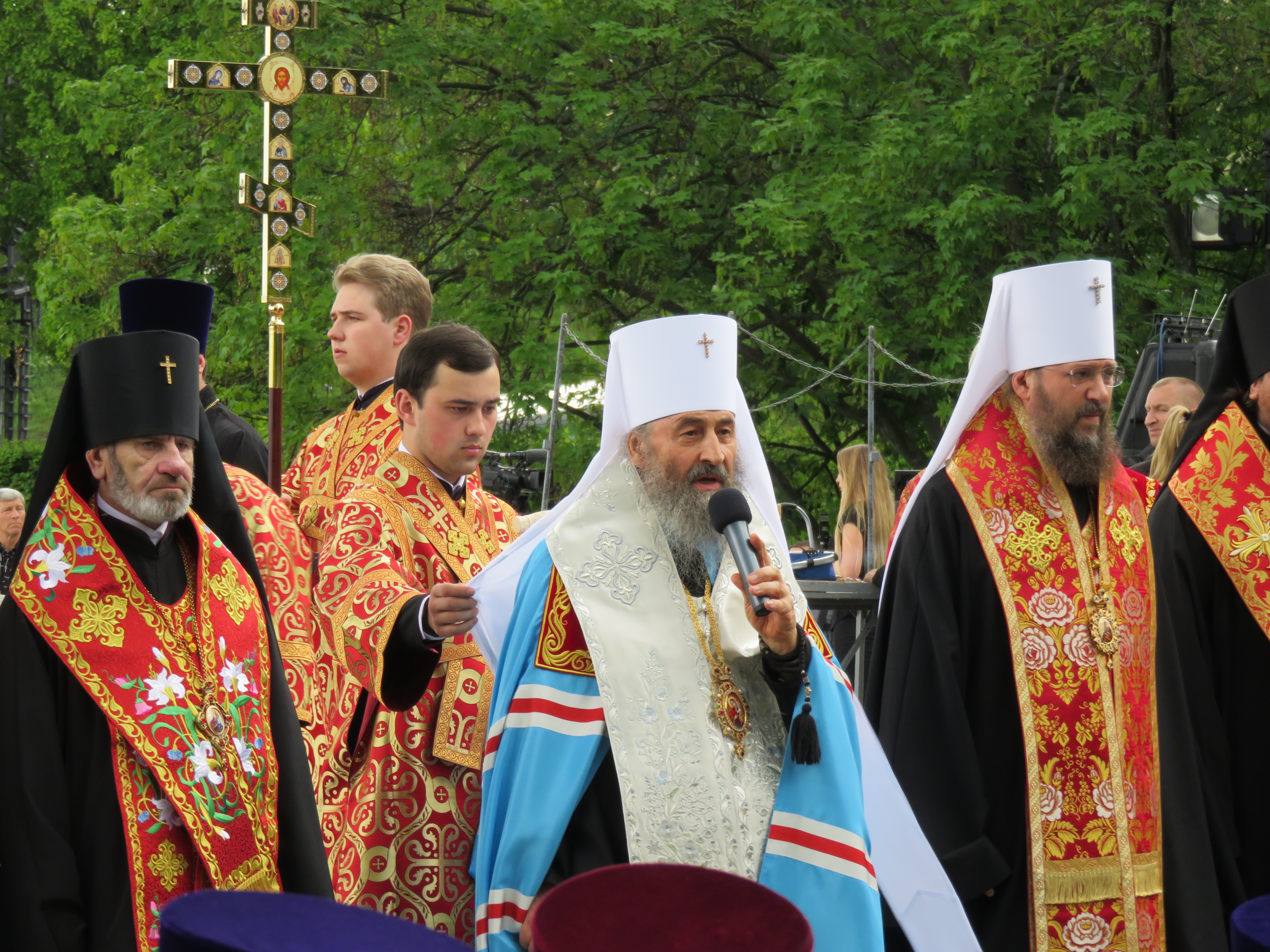 Митрополит Онуфрій (Березовський) під час молебню 8 травня 2016 у Парку Слави